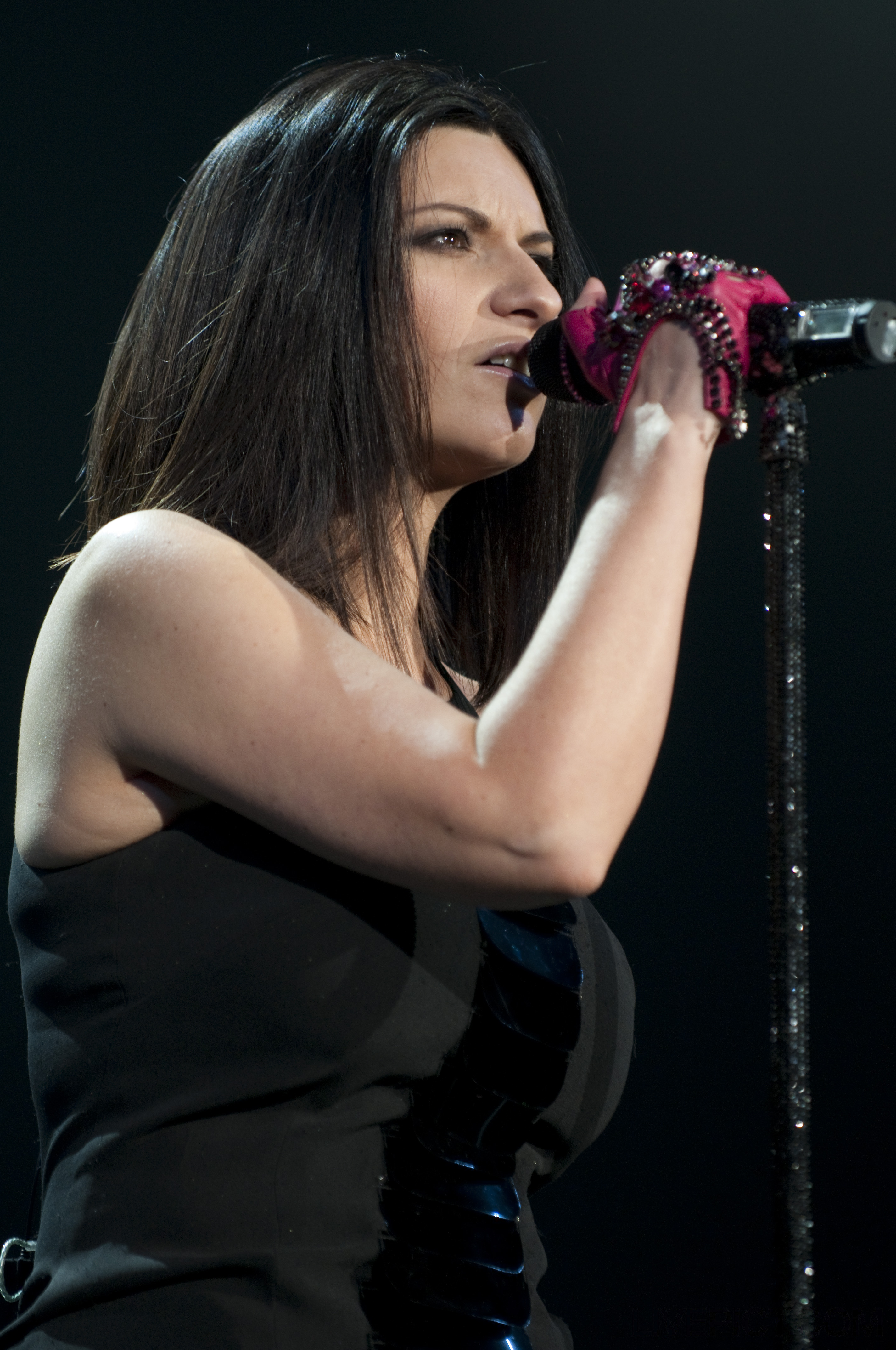 Laura Pausini